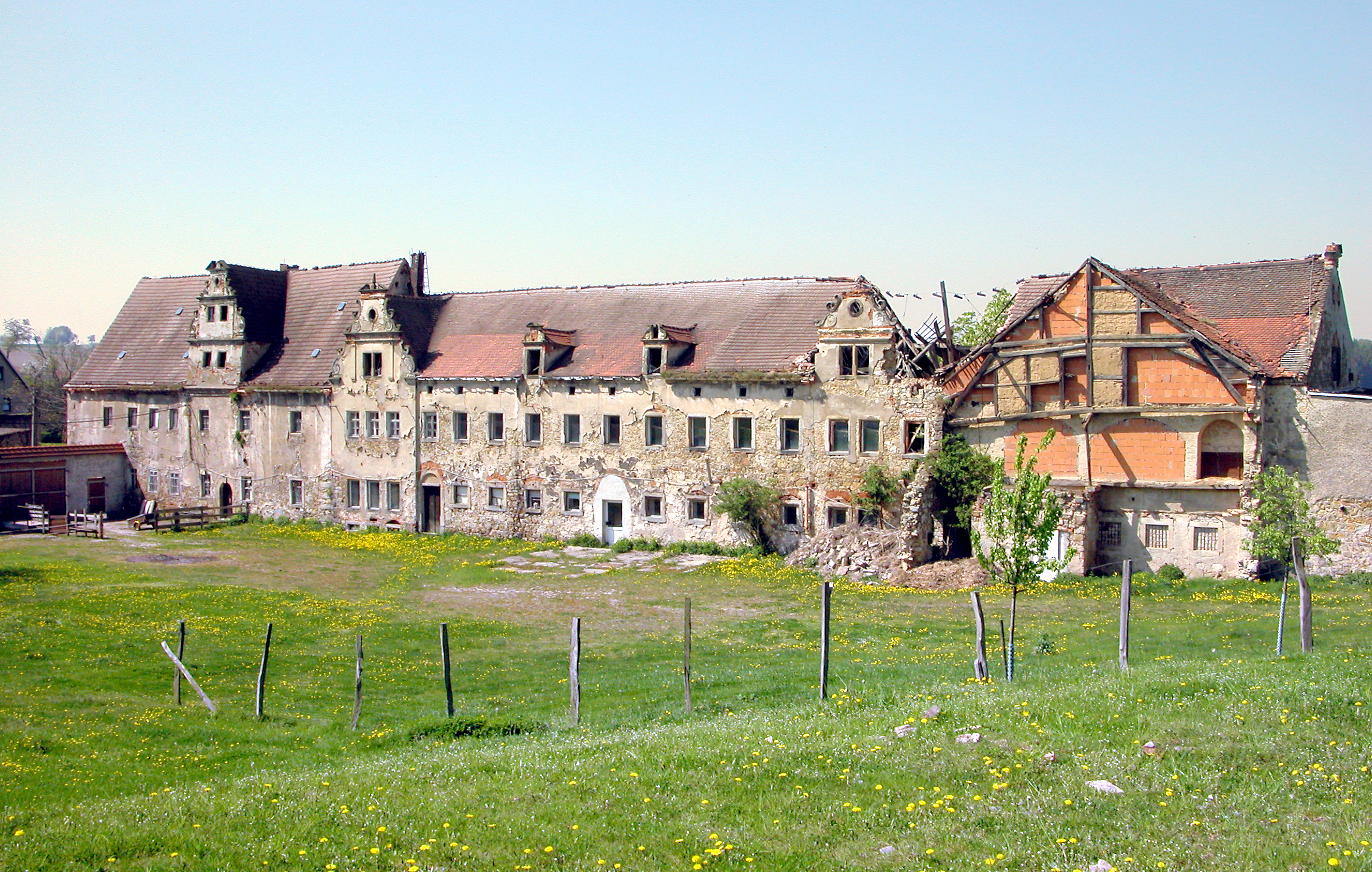 01.05.2012 01665 Schletta (Käbschütztal), Schletta 13: Rittergut mit Herrenhaus (Mitte 16. Jh.). Bis 1990 LPG, danach privatisiert, Verfall. [DSCNn3860.TIF]20120501220DR.JPG(c)Blobelt